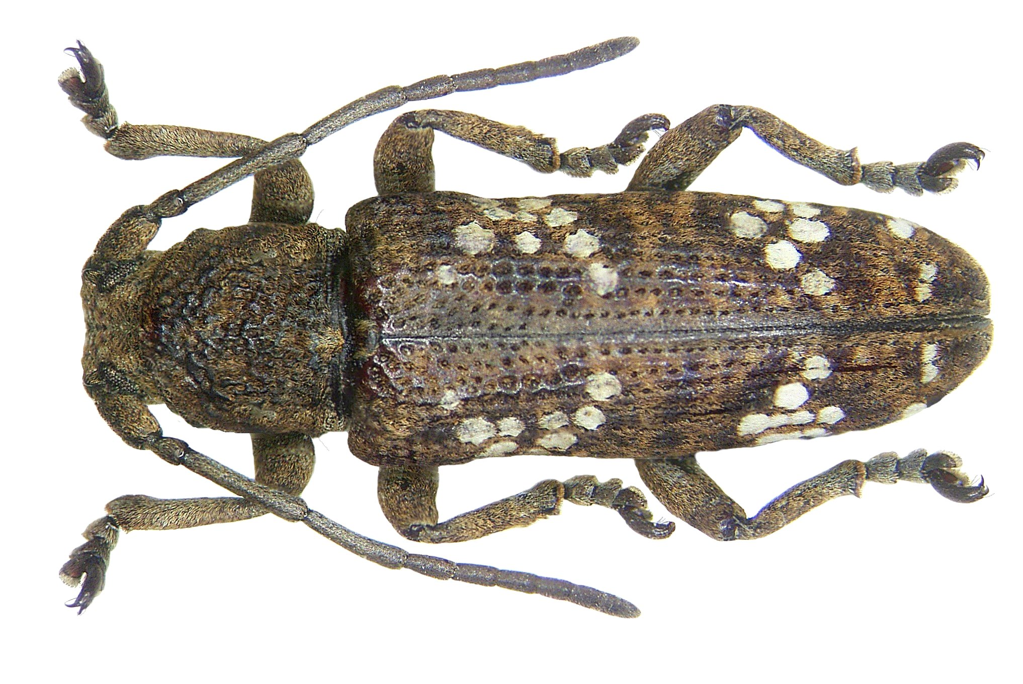 Familie: Cerambycidae Groesse: 13 mm Fundort: Nepal, Pokhara, 900 m leg. 2000; det. A.Weigel Photo: U.Schmidt, 2007